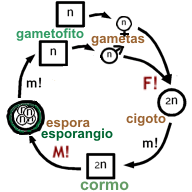 Diagrama esquemático del ciclo de vida de las cormofitas (Trachaeophyta, plantas vasculares). Referencias: n : generación haploide 2n : generación diploide m! : mitosis M! : meiosis F! : fecundación